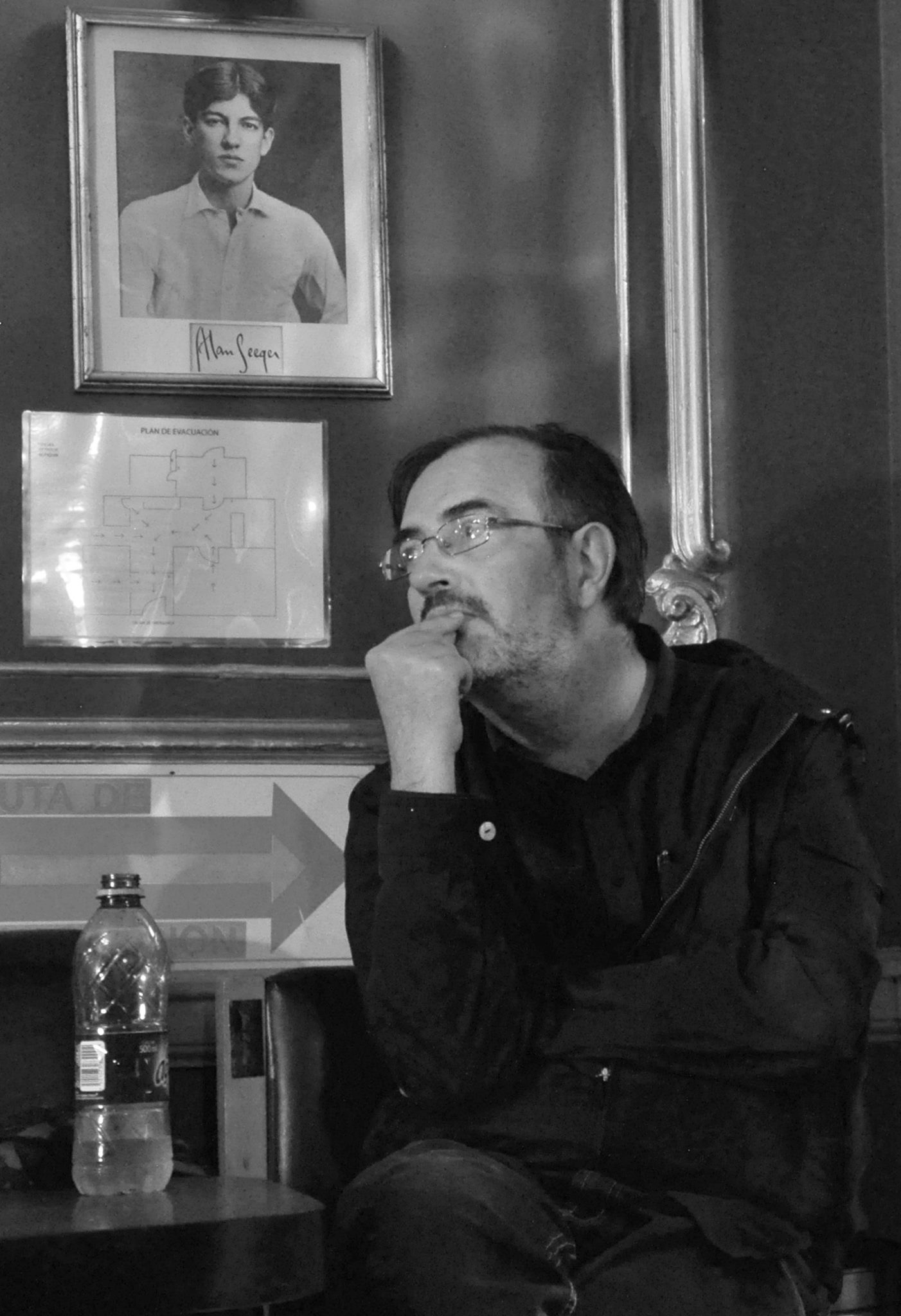 Pablo Soler Frost en 2015.